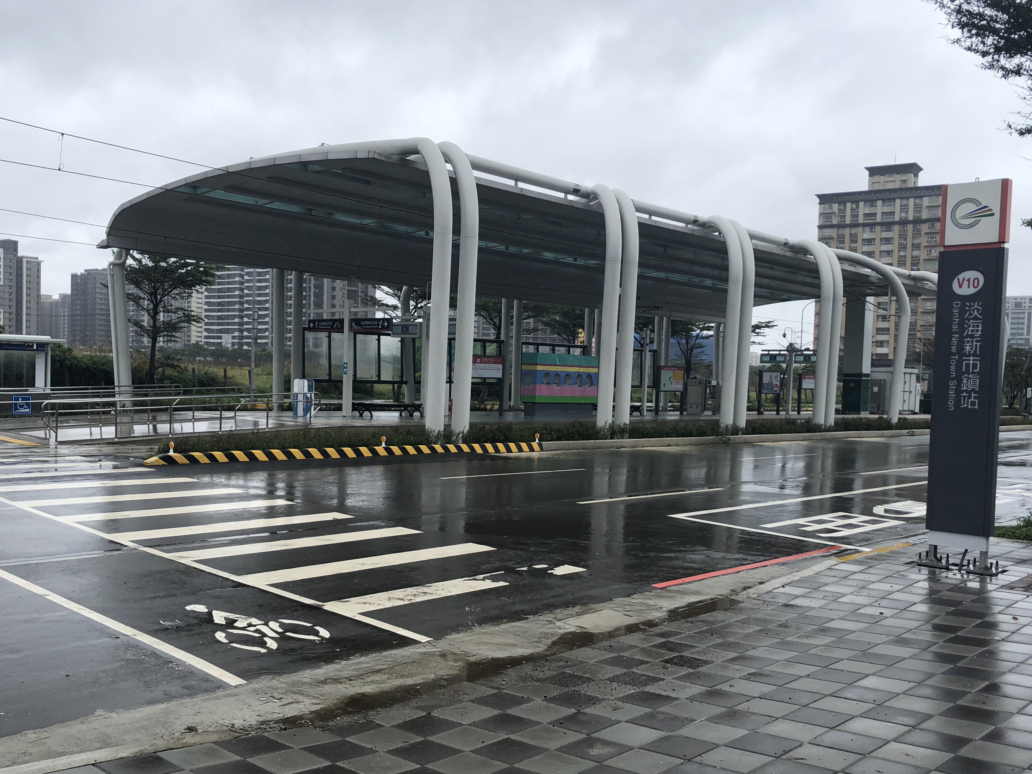 淡海新市鎮站